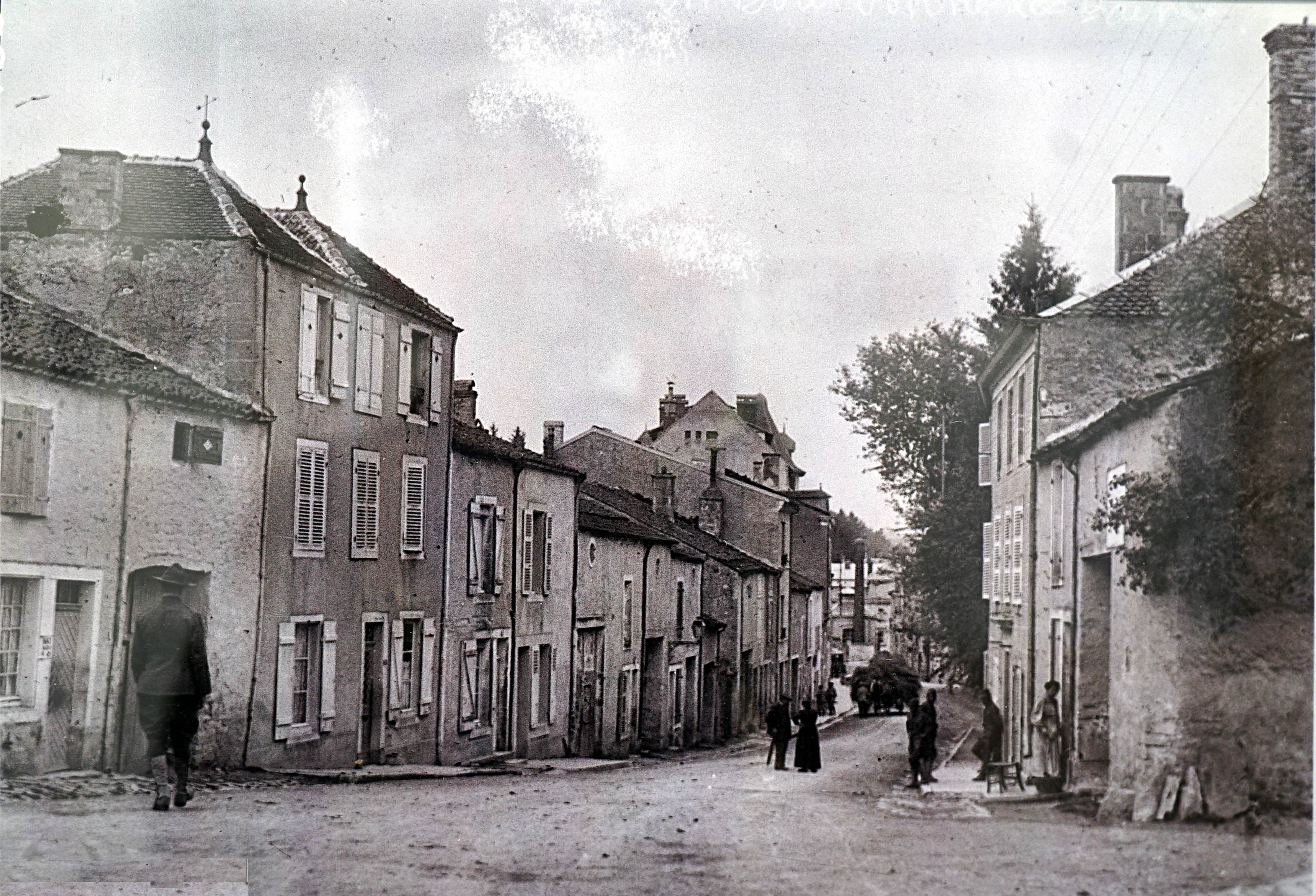 sur une vue ancienne.